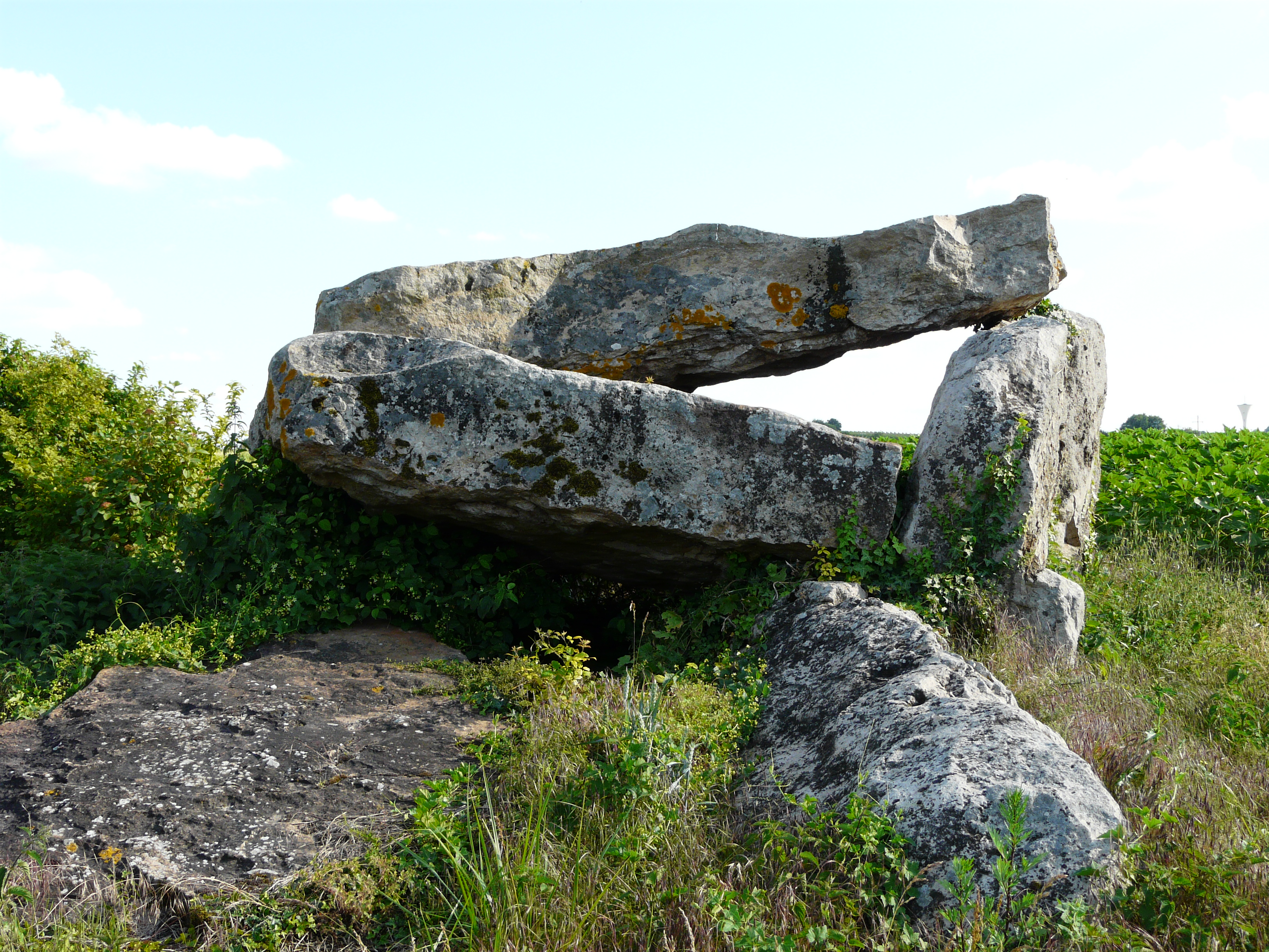 Dolmen de la Fontaine de Son n°1, Saint-Léger-de-Montbrillais, Vienne, France